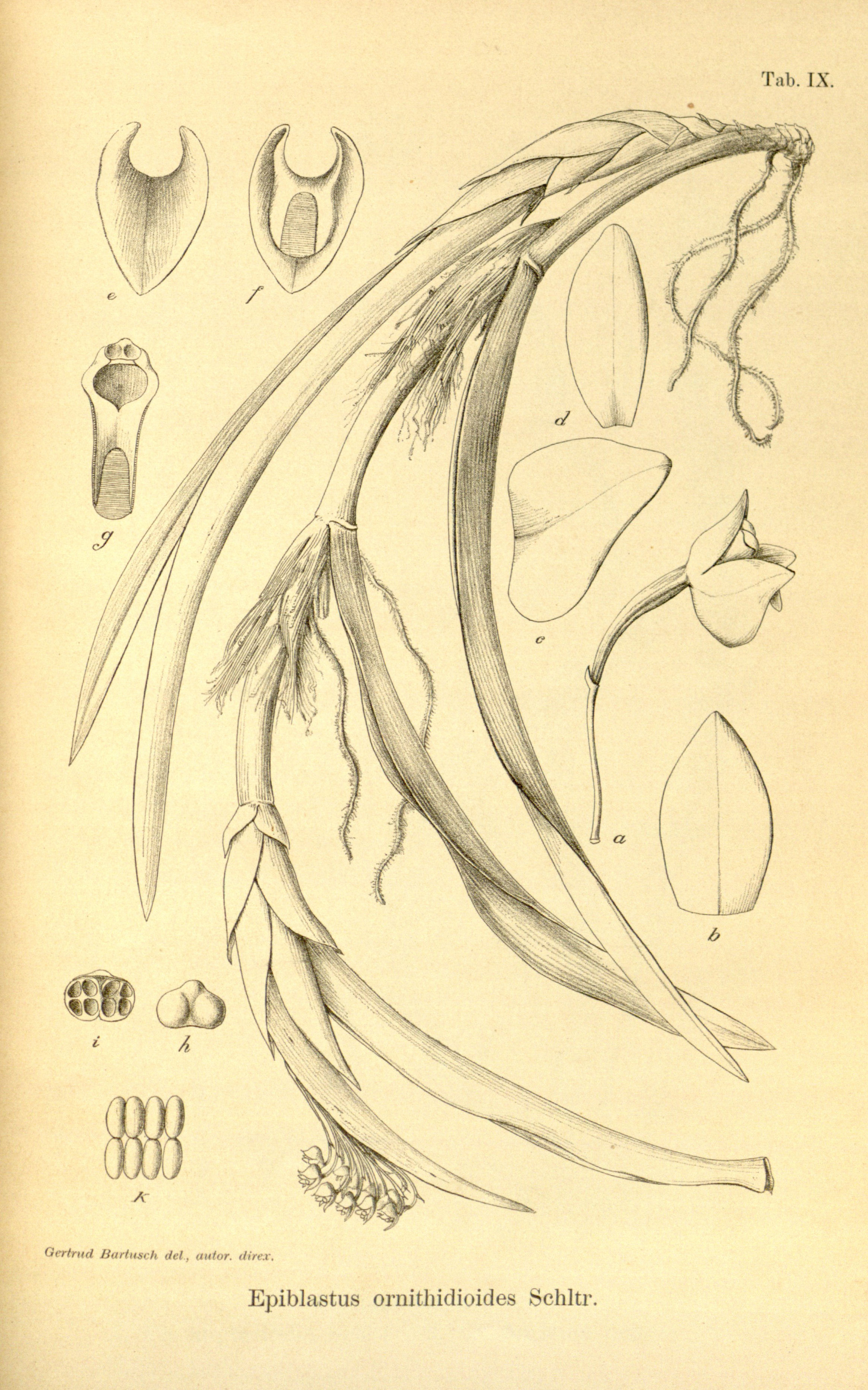 Epiblastus ornithidioides